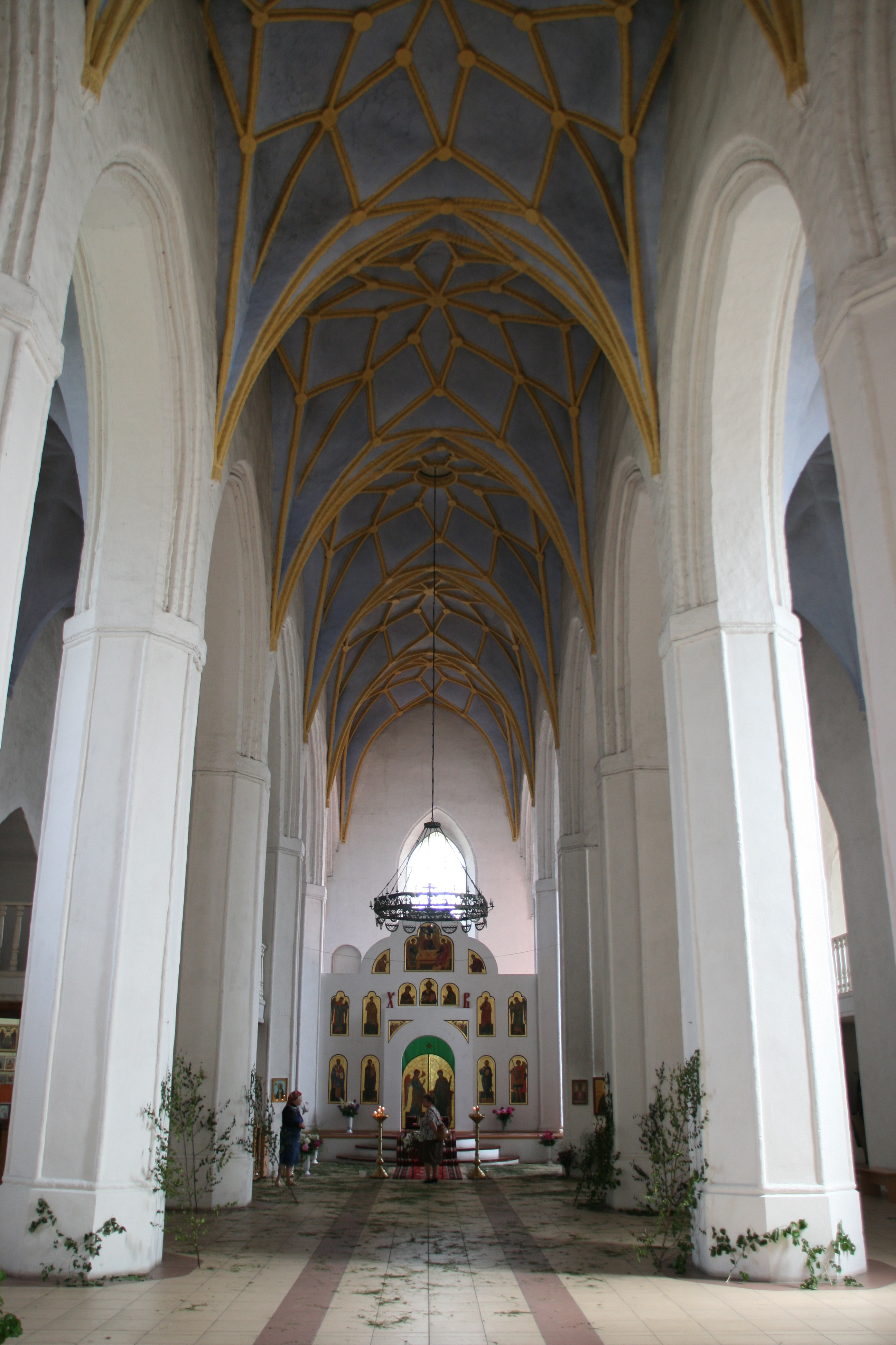 Innenansicht der Hauptkirche in Friedland/Prawdisk